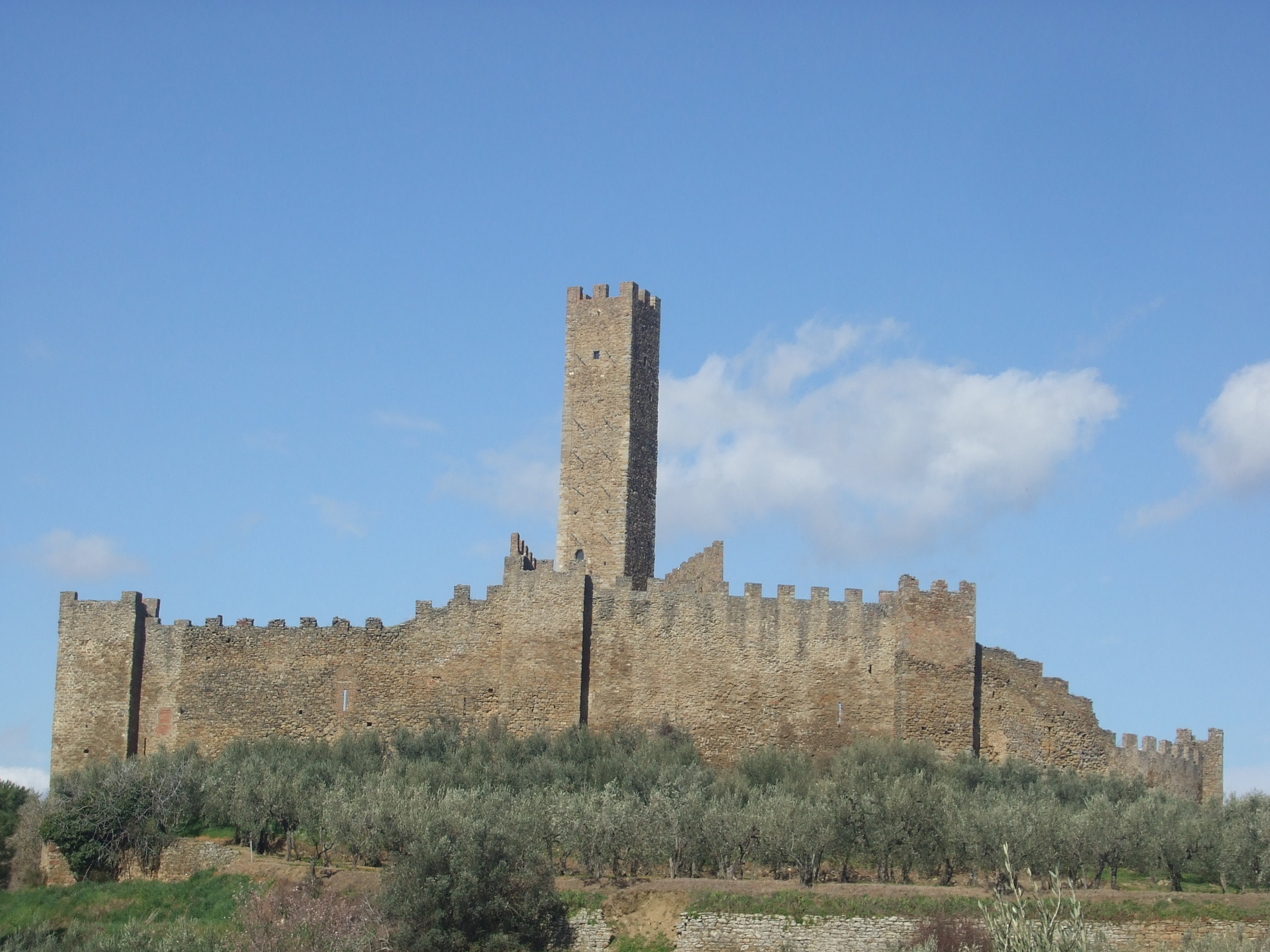 Montecchio Vesponi sud